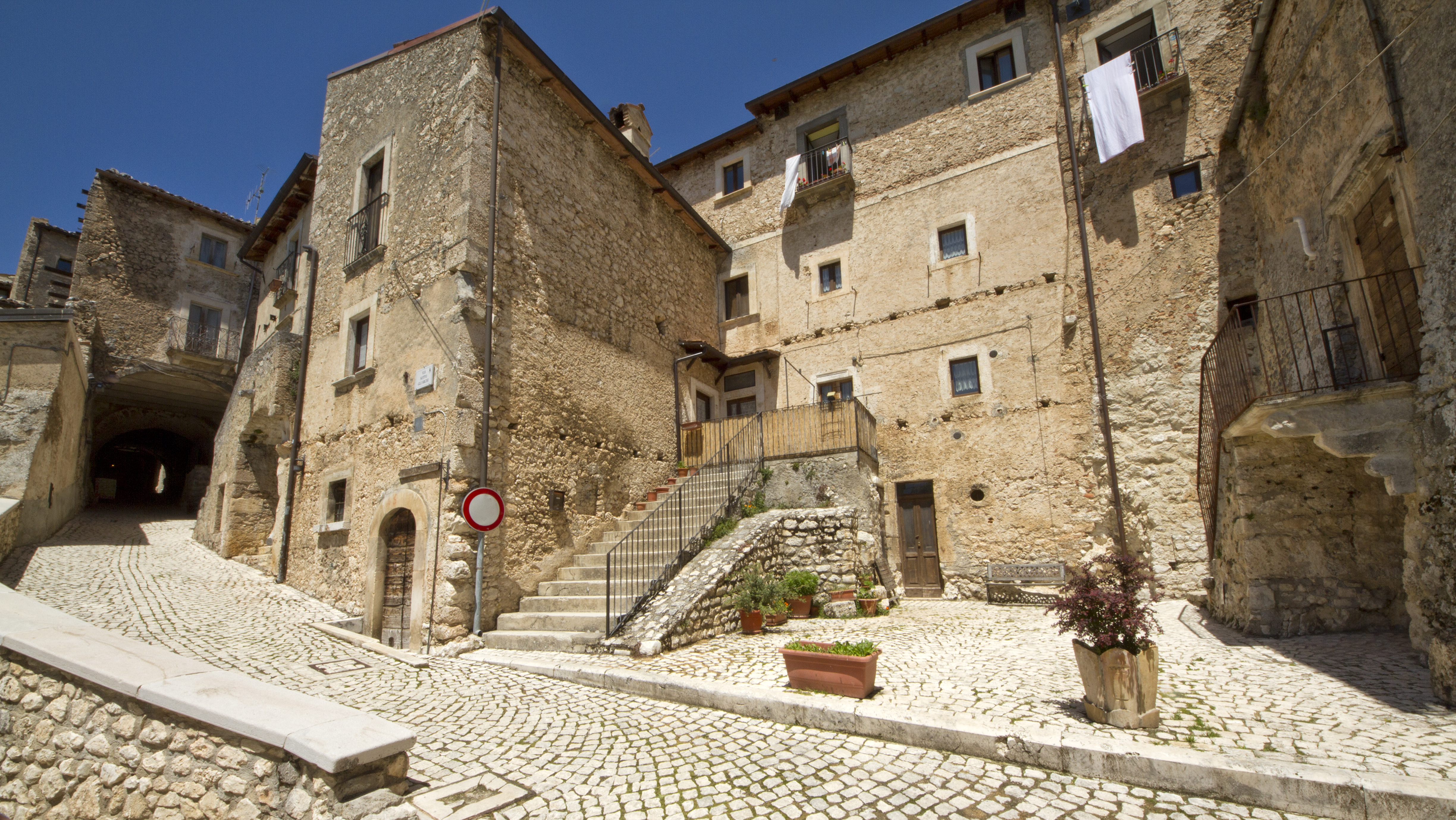 67020 Santo Stefano di Sessanio AQ, Italy